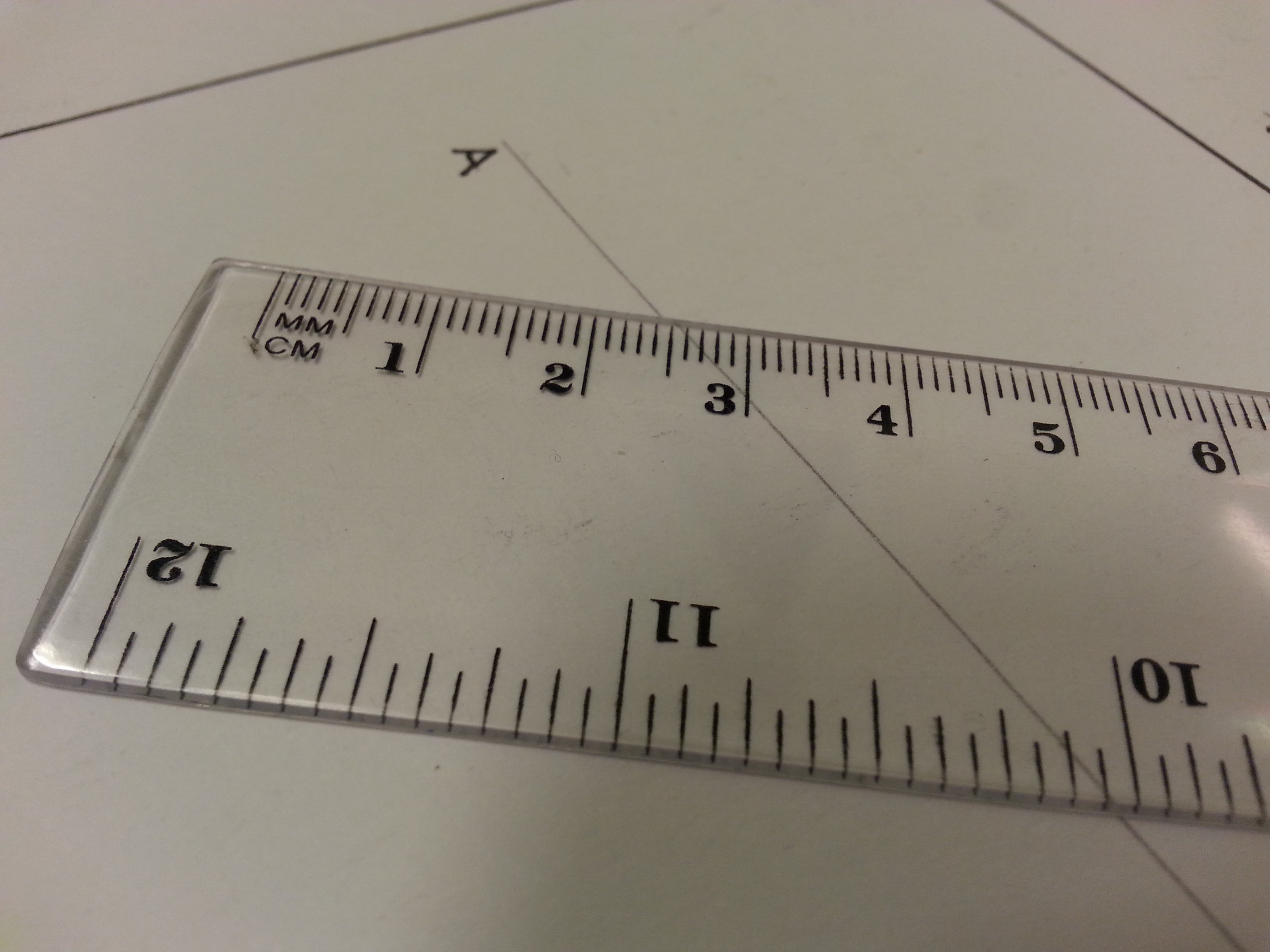 Erregela graduatu baten muturra. 12 hazbete, 30 cm (300 mm).